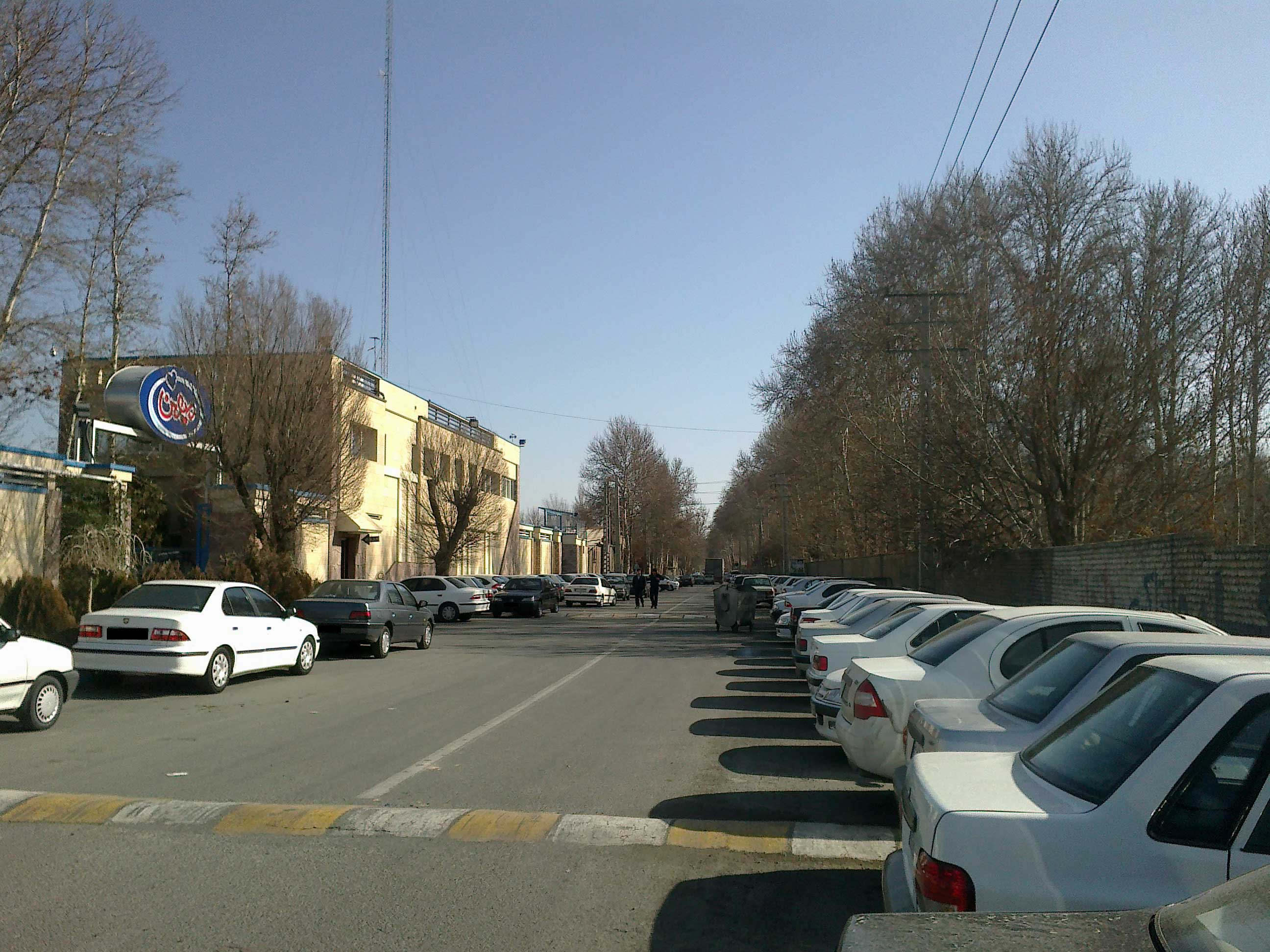 MohammadShahr, Karaj, Iran